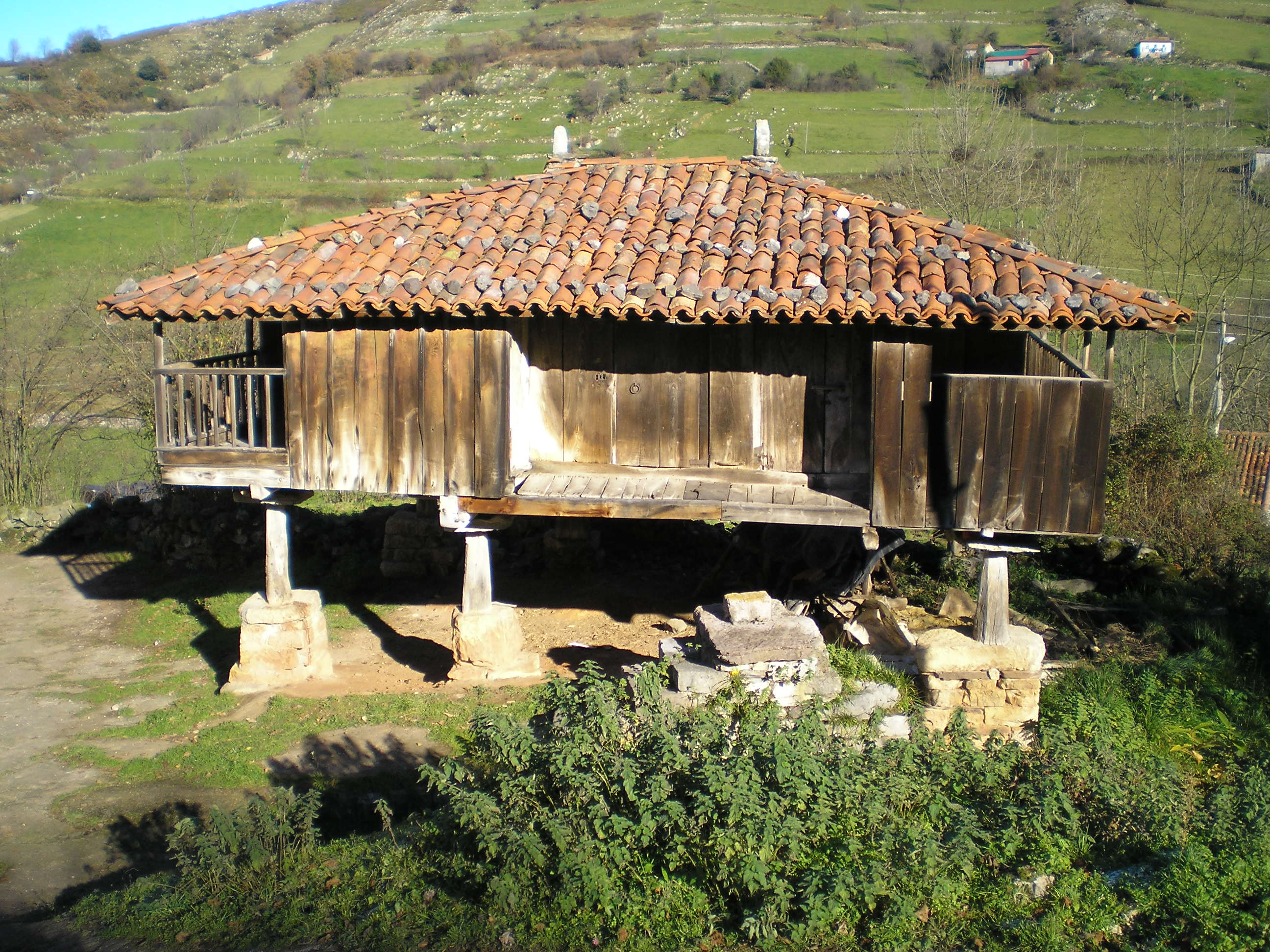 Panera típica asturiana, con tejado de teja y pegollos de madera en Rubiano (Grado, Asturias).